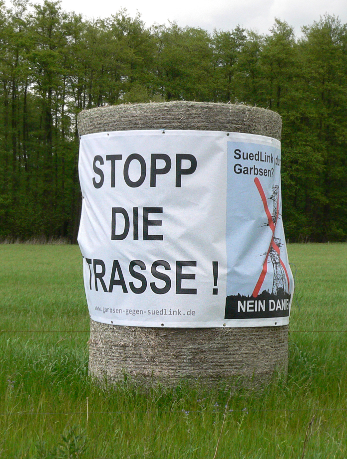 Strohballen mit Protestplakat gegen SuedLink-Trasse bei Garbsen, die Plakatabbildung wird ausdrücklich als gemeinfrei erklärt, die Nutzung des Motivs allgemein erlaubt, siehe hier